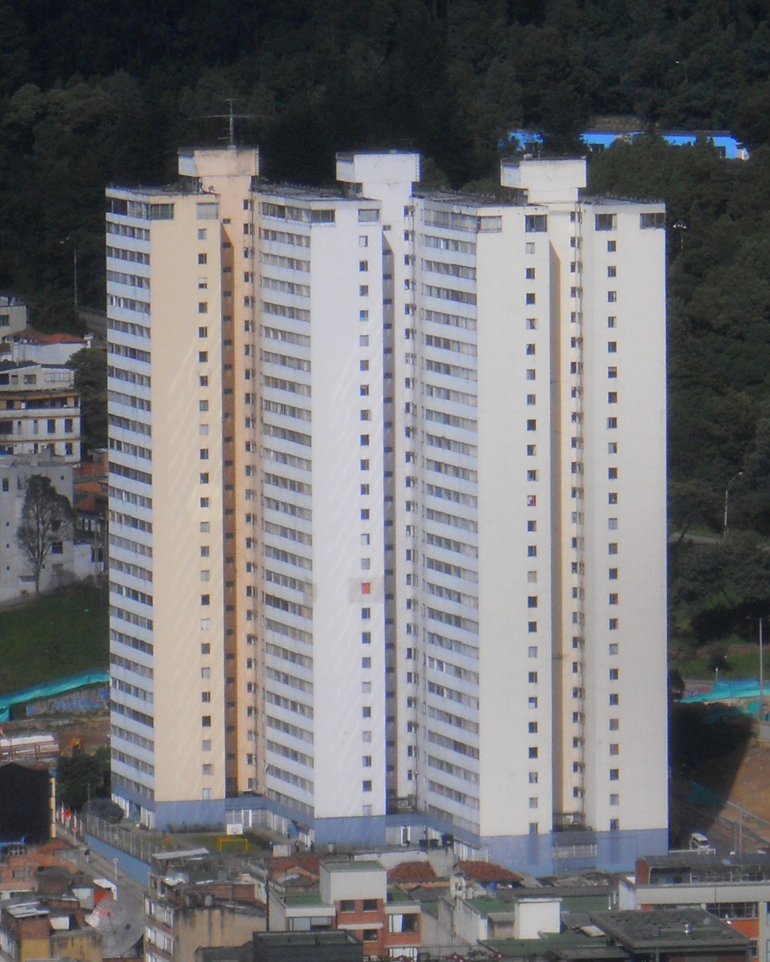 Torres blancas, av El dorado con cra 3. Las Nieves.